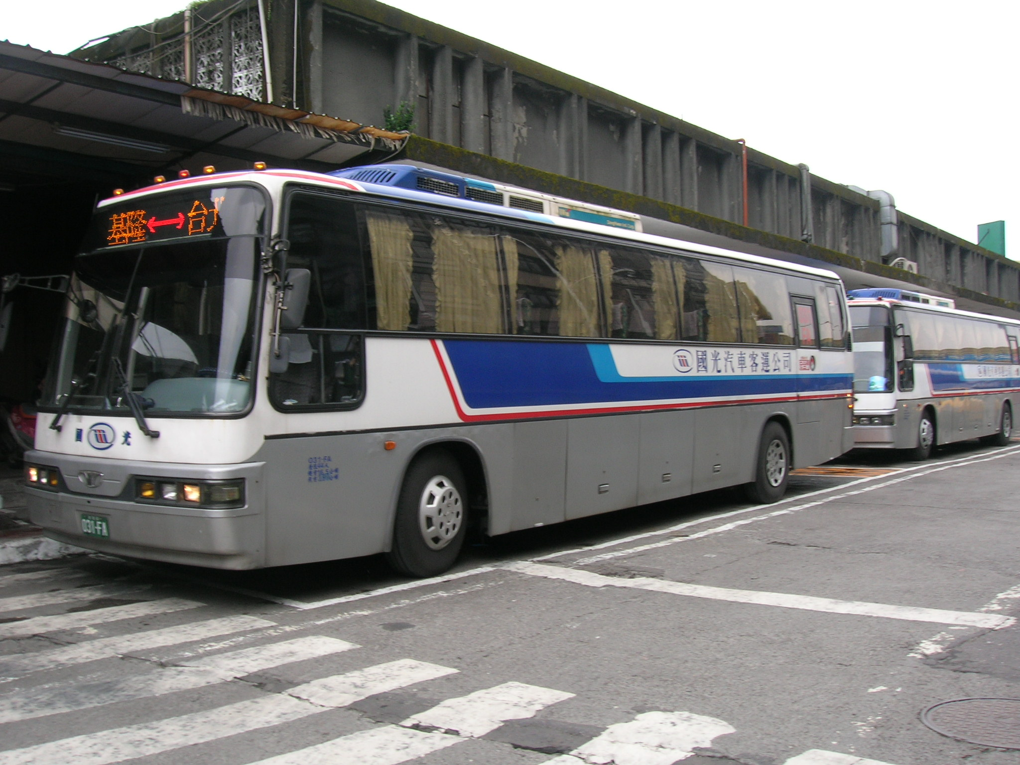 國光客運大宇BH120大客車031-FA停靠國光客運基隆車站舊站。